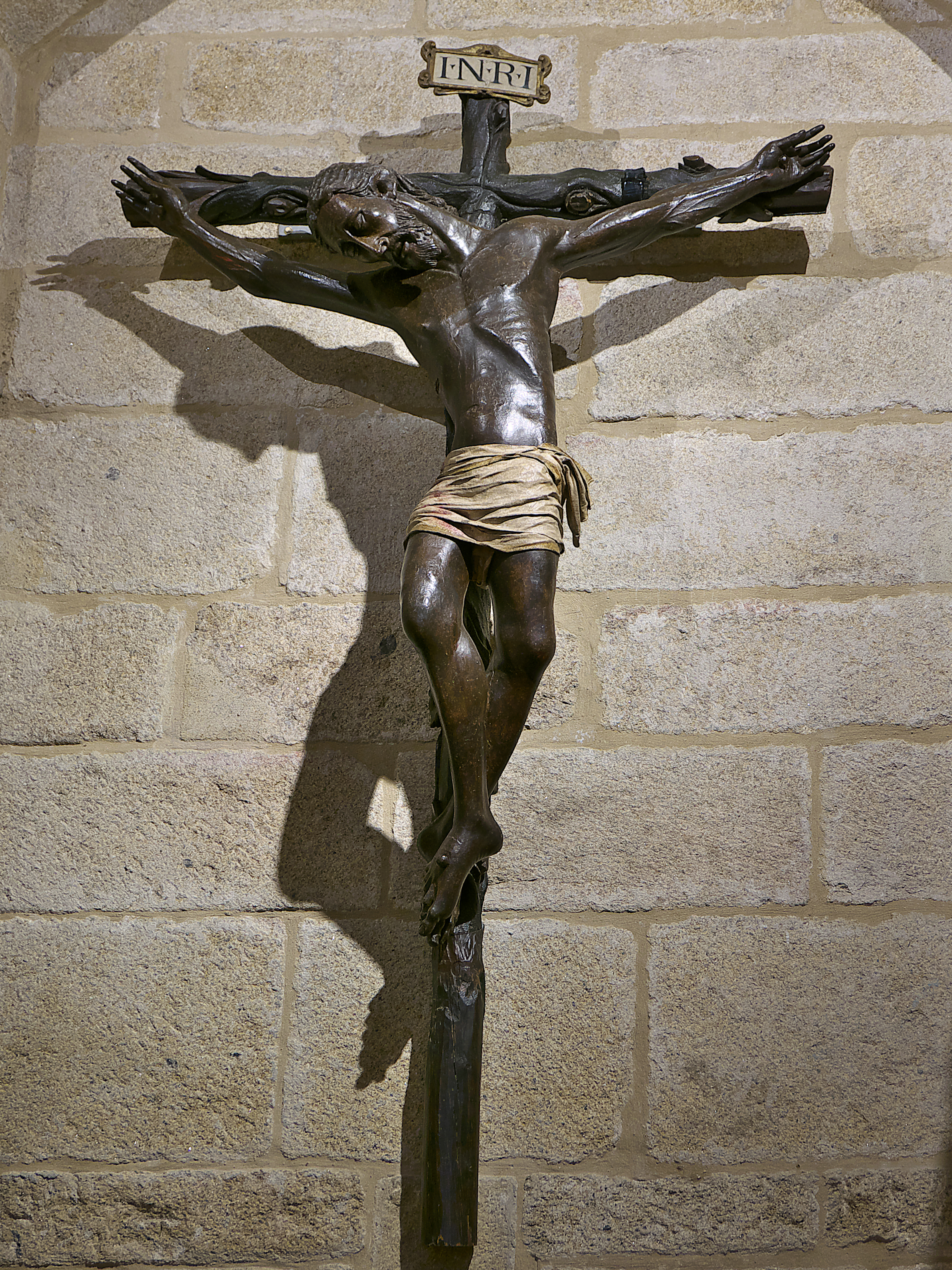 Conocido como Cristo Negro (s. XIV), titular de La muy Solemne, Venerable y Pontificia Cofradía Hermandad del Santo Crucifijo de Santa María de Jesús, Concatedral de Cáceres.